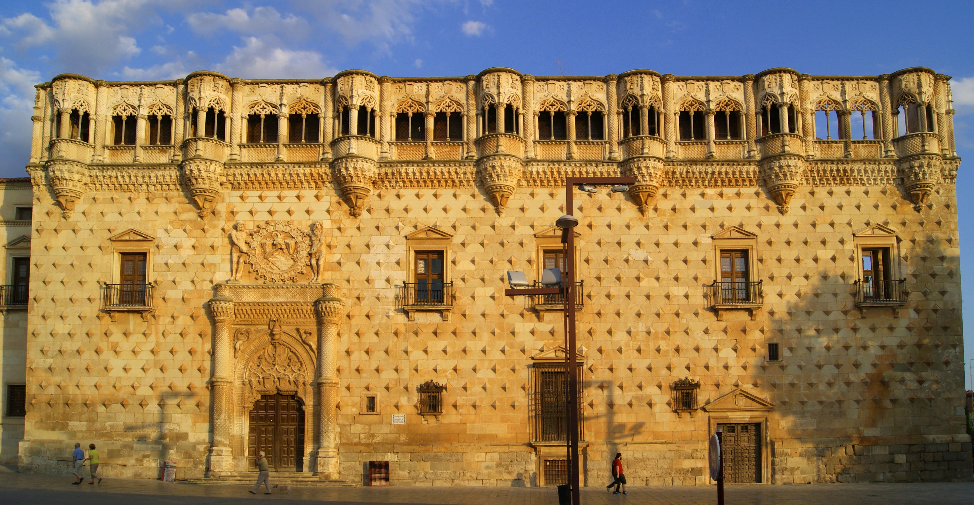 Palace of Infantado, Guadalajara